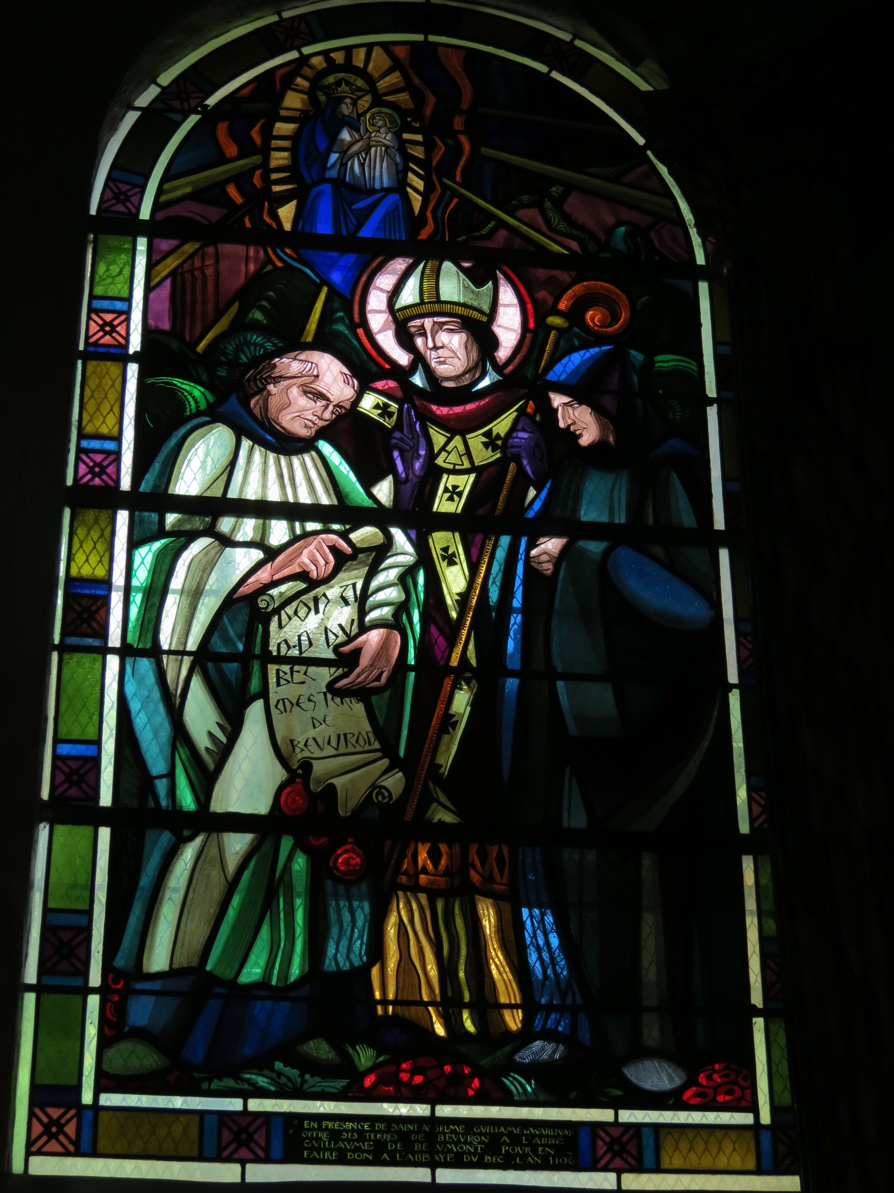 Vitrail de l'église de Beuvron-en-Auge représentant Guillaume de Warlevast offrant en 1106 ses terres de Beuvron à l'abbé Guillaume de Beaumont pour en faire don à l'abbaye du bec, en présence d'Anselme.